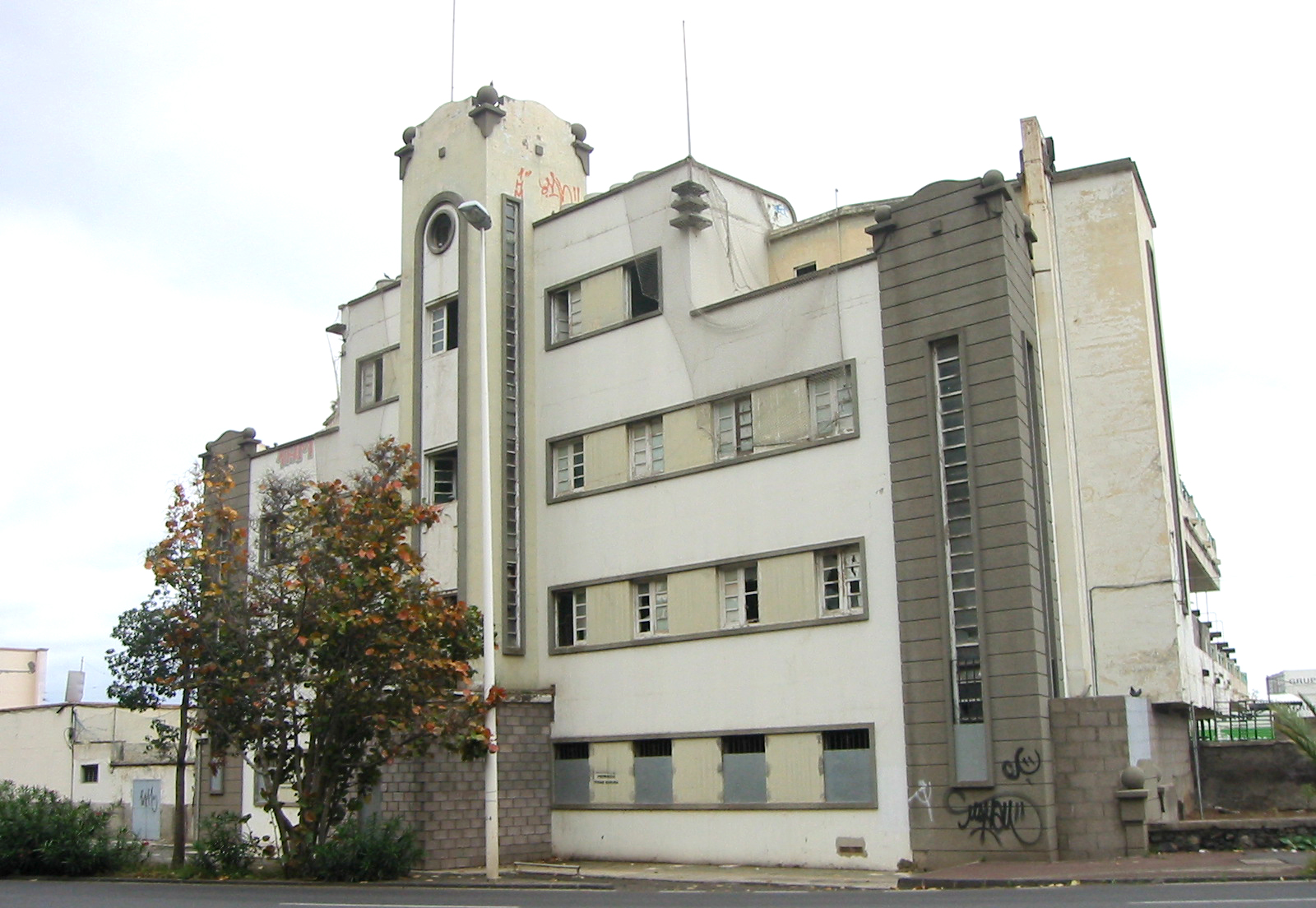 Balneario de Santa Cruz de Tenerife en estado de abandono